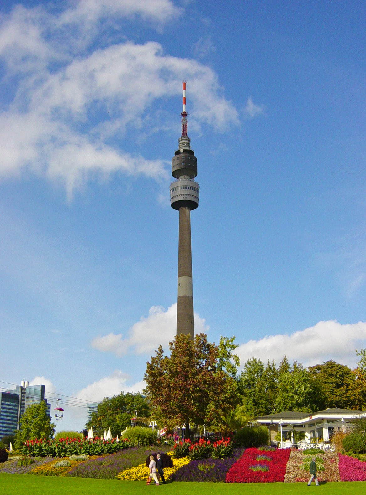 Westfalenpark in Dortmund mit Florian Turm